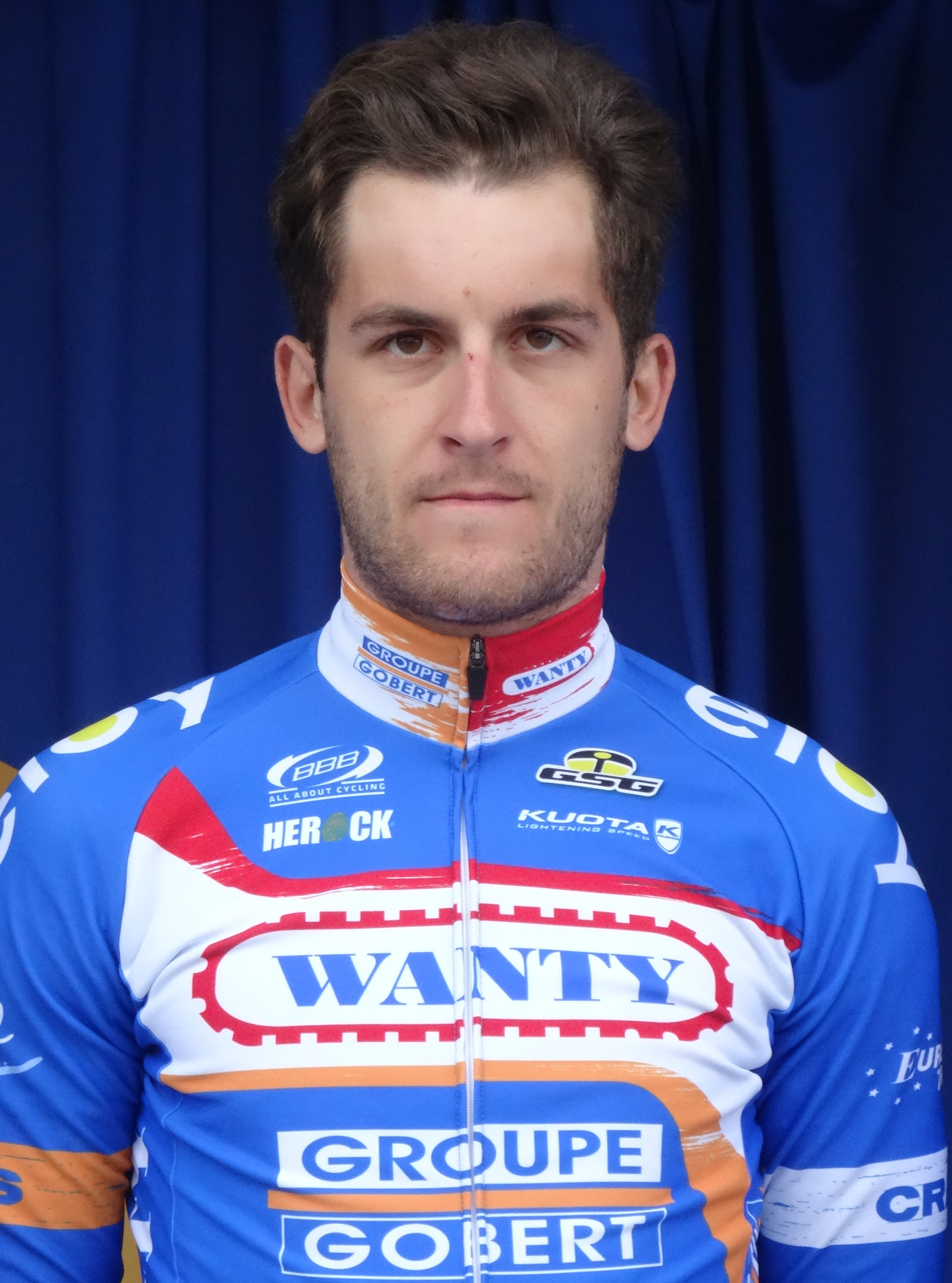 Reportage photographique réalisé le jeudi 8 mai 2014 au départ de la deuxième étape de l'édition 2014 des Quatre jours de Dunkerque à Hazebrouck, Nord, Nord-Pas-de-Calais, France. Depicted person: Tim De Troyer Depicted team: Wanty-Groupe Gobert